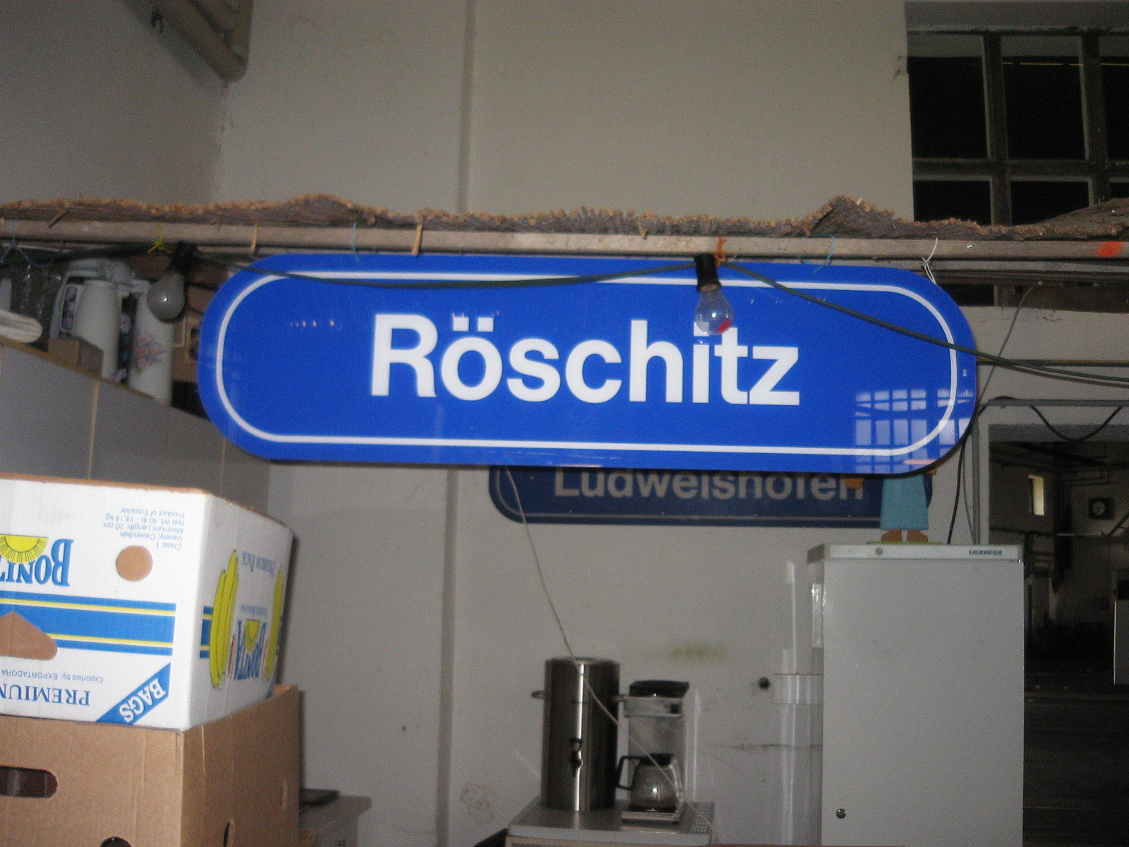 Bahnhofsschild von der Haltestelle Röschitz